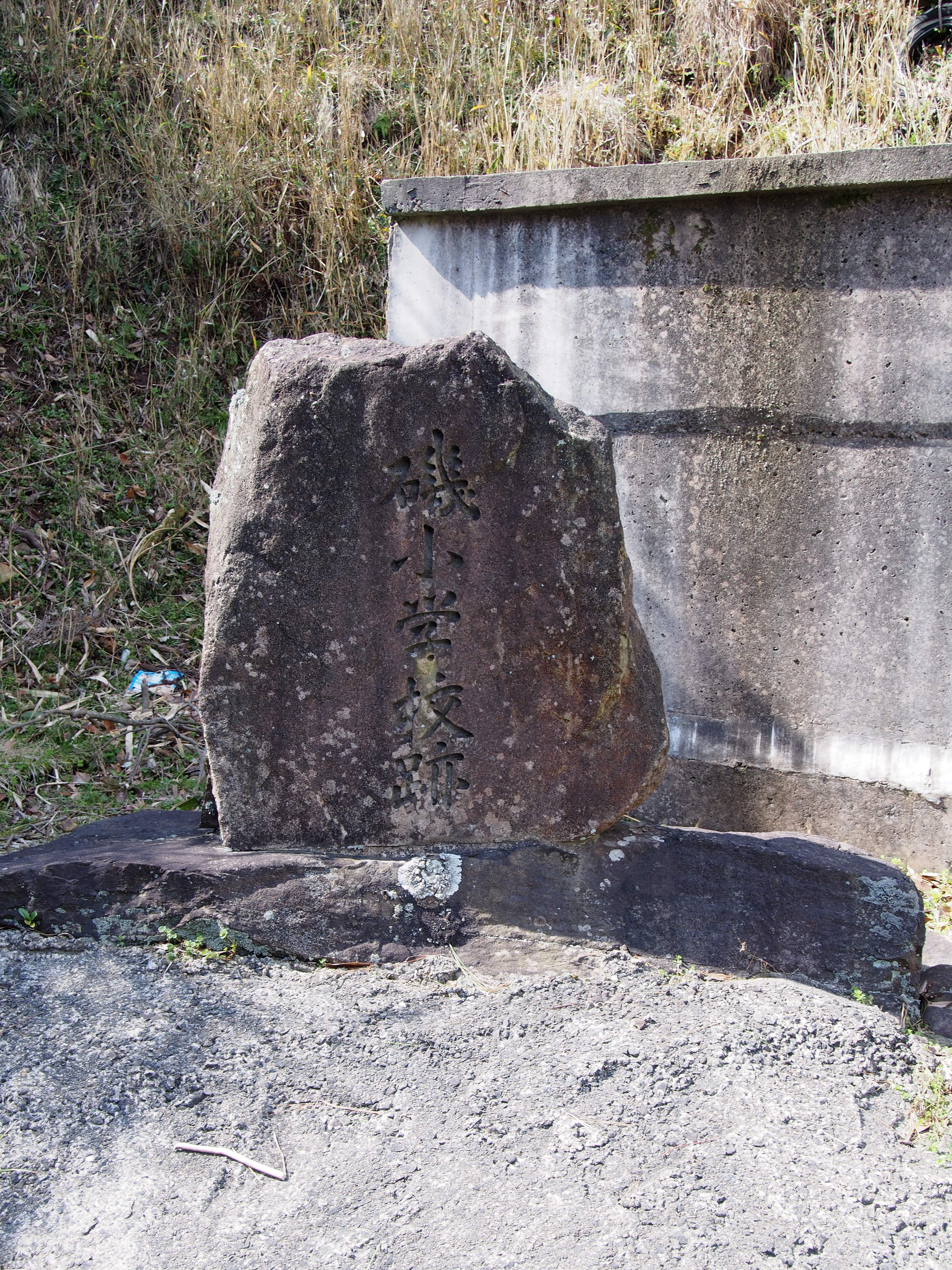 「磯小学校跡」石碑（京都府京丹後市網野町磯）